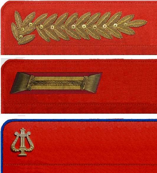 петлицы орпк